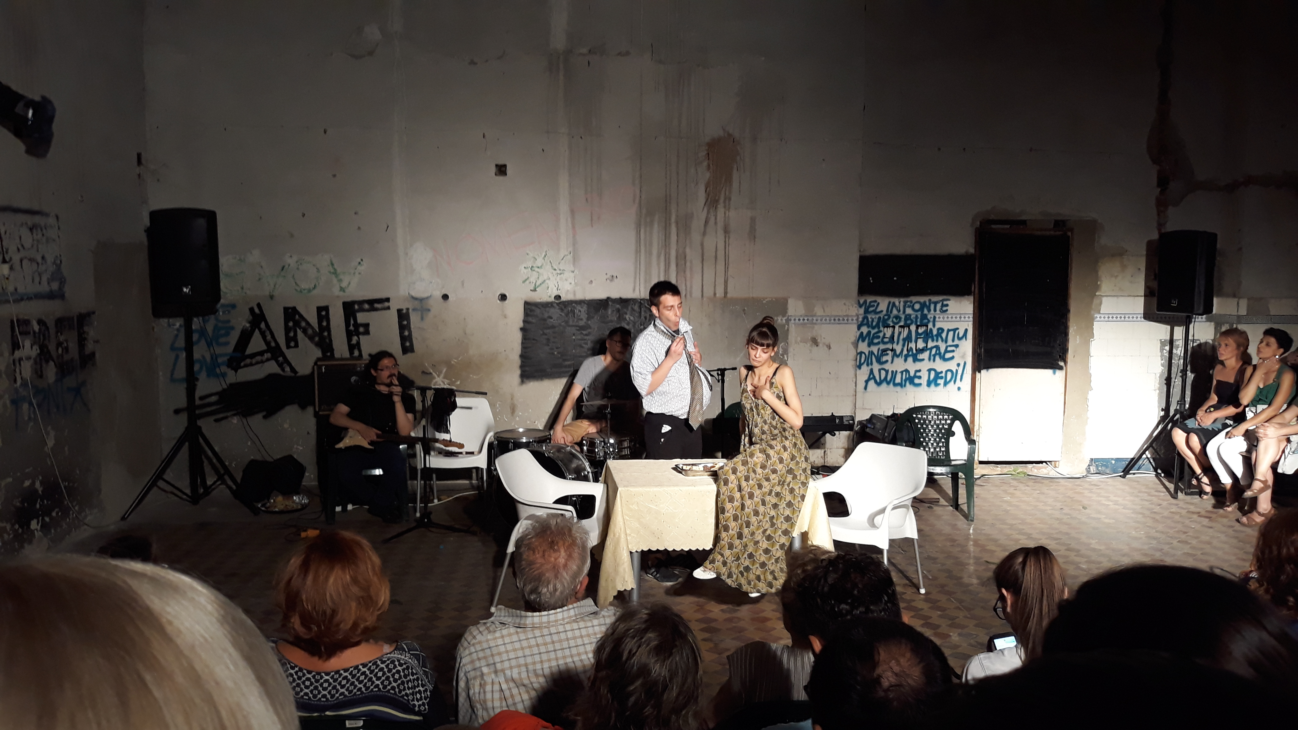 Представа Shakespeare tribute band / Shakespeare party, у извођењу студената глуме Академије уметности Универзитета у Новом Саду, класа професора Никите Миливојевића. Фотографије су начињене на претпоследњој вечери фестивала А. Н. Ф. И. театар у Краљеву. Играју: Дарко Радојевић, Ђорђе Митровић, Огњен Никола Радуловић, Ненад Поповић, Милош Мацура, Маја Чампар, Николина Вујевић, Аница Петровић, Марија Фелдеши, Невена Неранџић, Алекса Пантић, Ружица Ања Тадић, Владислав Велковски и Иван Вања Алач.